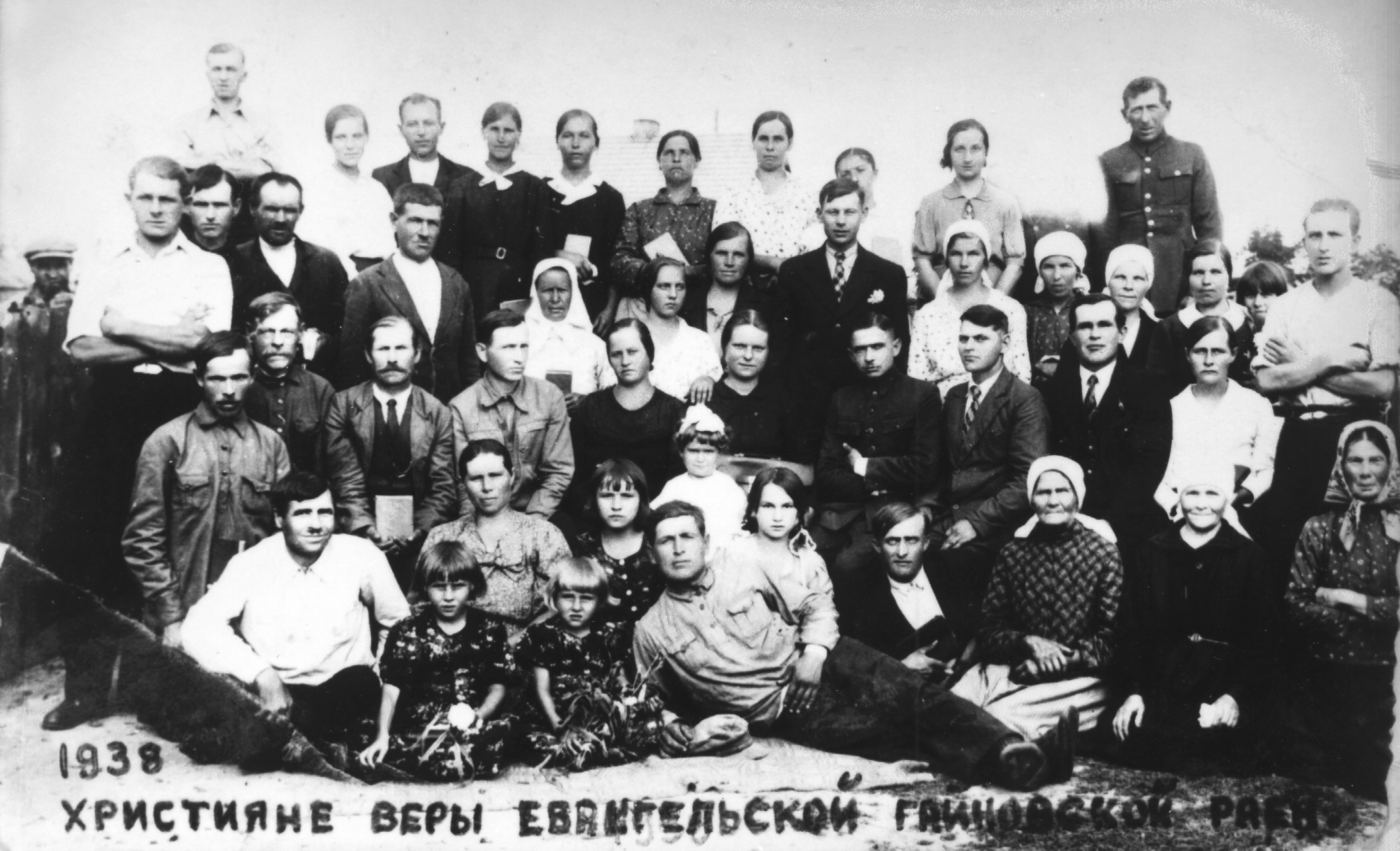 Pentecostal Church in Hajnówka (1938)